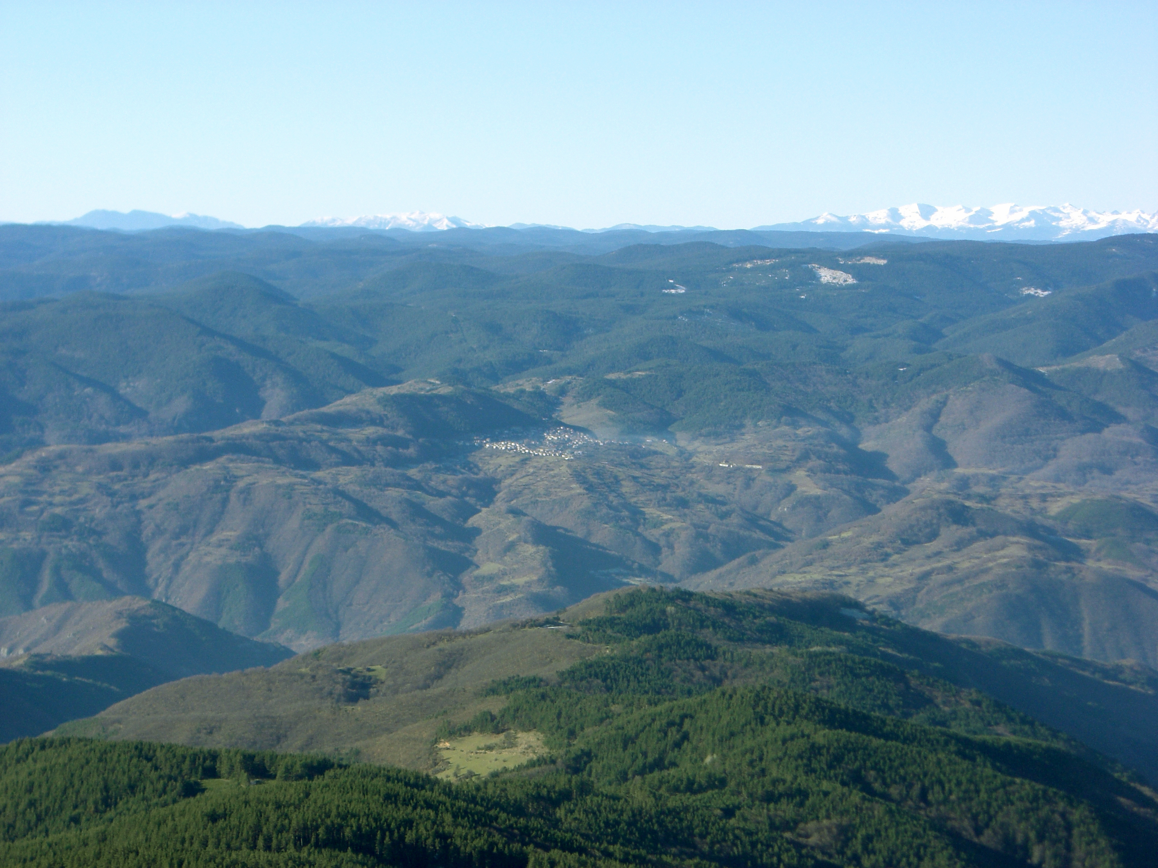 Изглед към с. Селча от вр. Модър